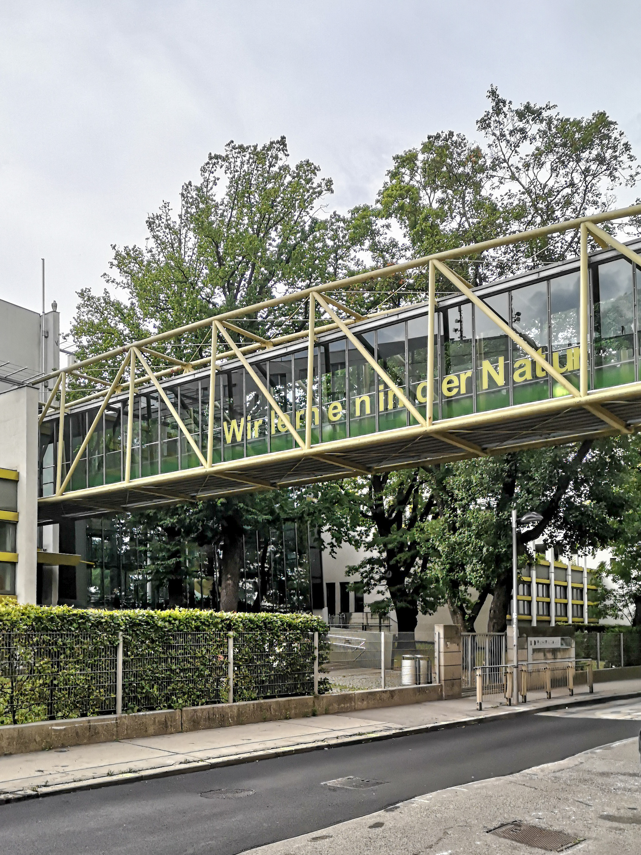 Mittelschule Dirmhirngasse (Brückenschule) mit 2 Baumhaseln (Corylus colurna) This media shows the natural monument in Vienna with the ID 511.